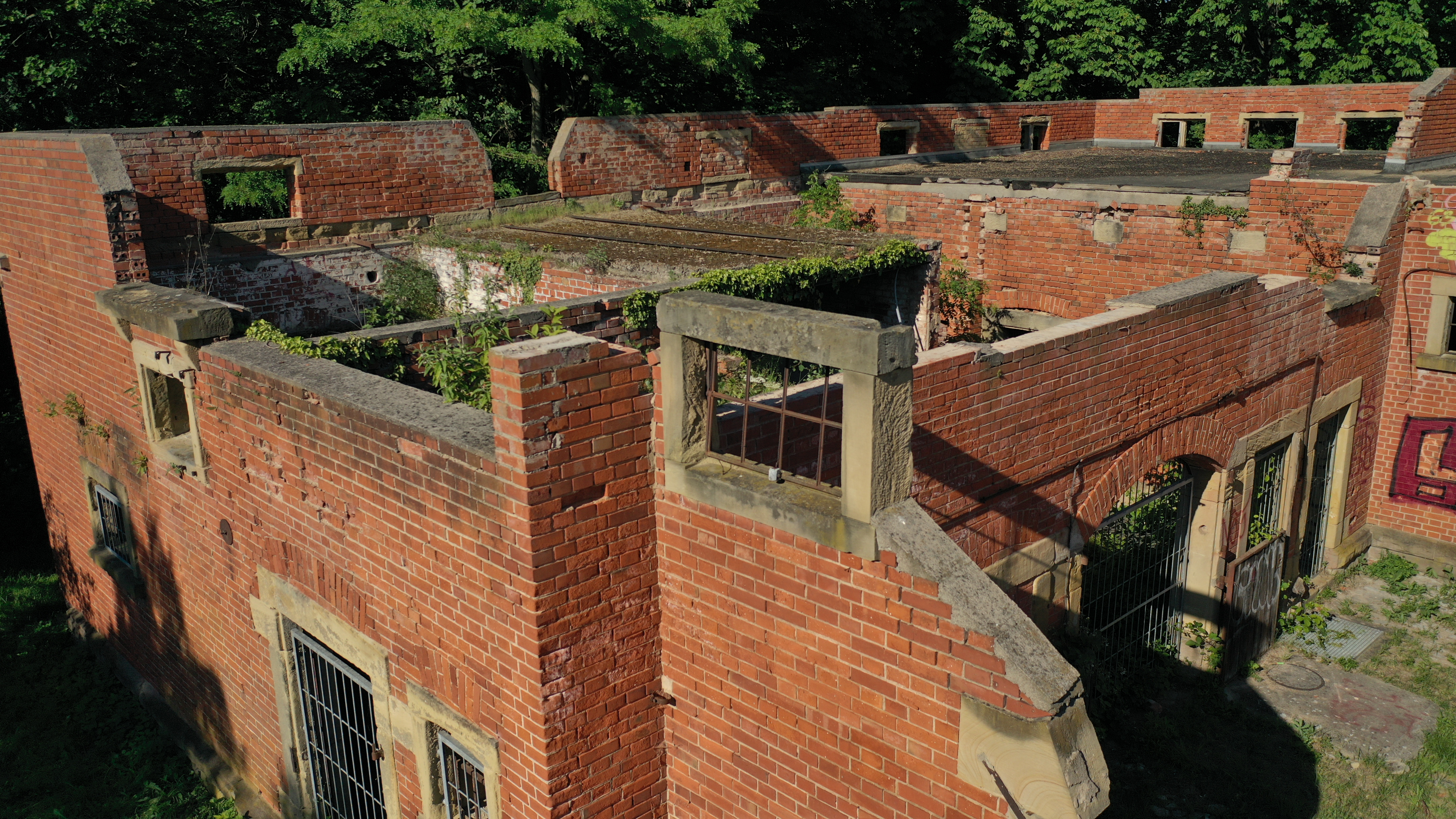 Lost Place in Ludwigsburg - Ruine des einstigen Pferdestalls des Landgut Marienwahl